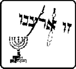 Logo hnutí Zo Arcejnu